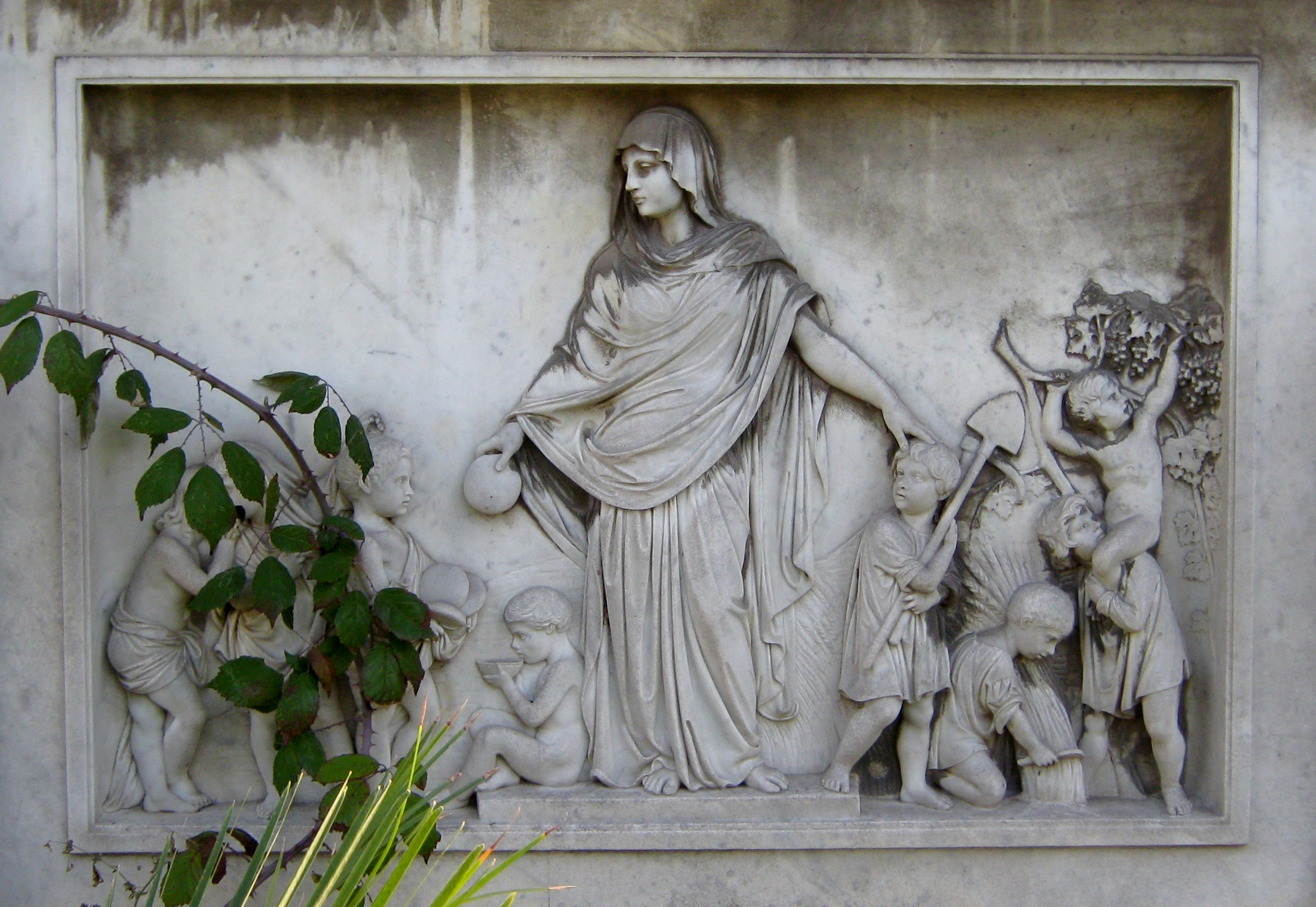 Livorno, Nuovo cimitero degli Inglesi: tomba di Thomas Lloyd, opera di Temistocle Guerrazzi